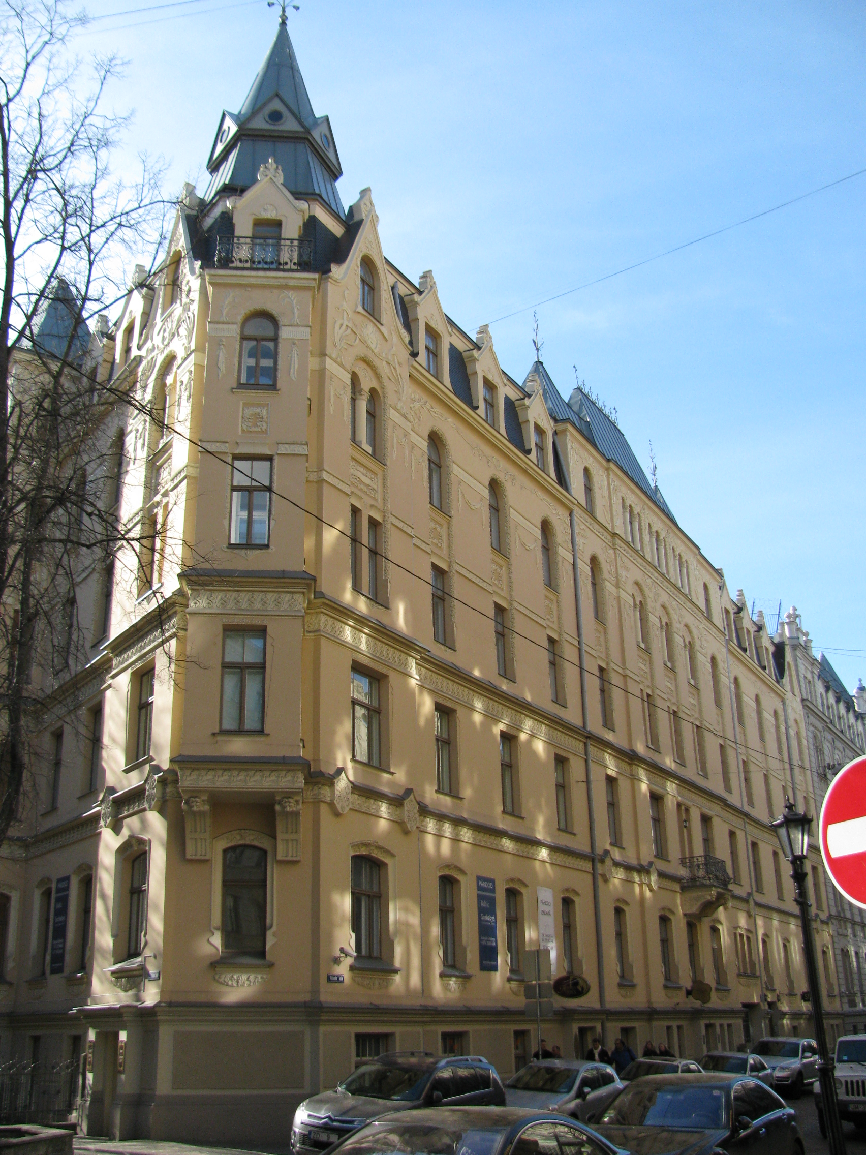 Īres nams, Rīga, Alberta iela 1